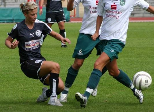 Wattenscheid-Duisburg